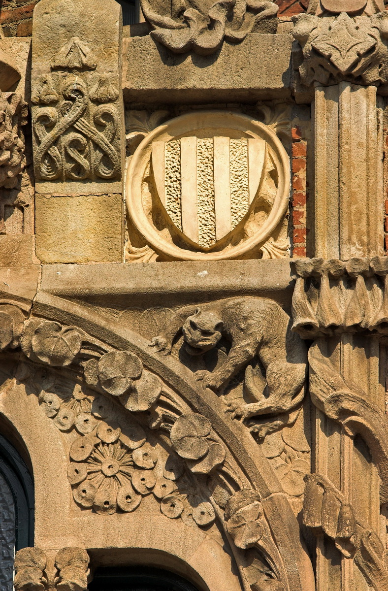 Detall d'escultura decorativa al pavelló de la Mercè. Hospital de Sant Pau, obra modernista de Domènech i Montaner (1905-1913).